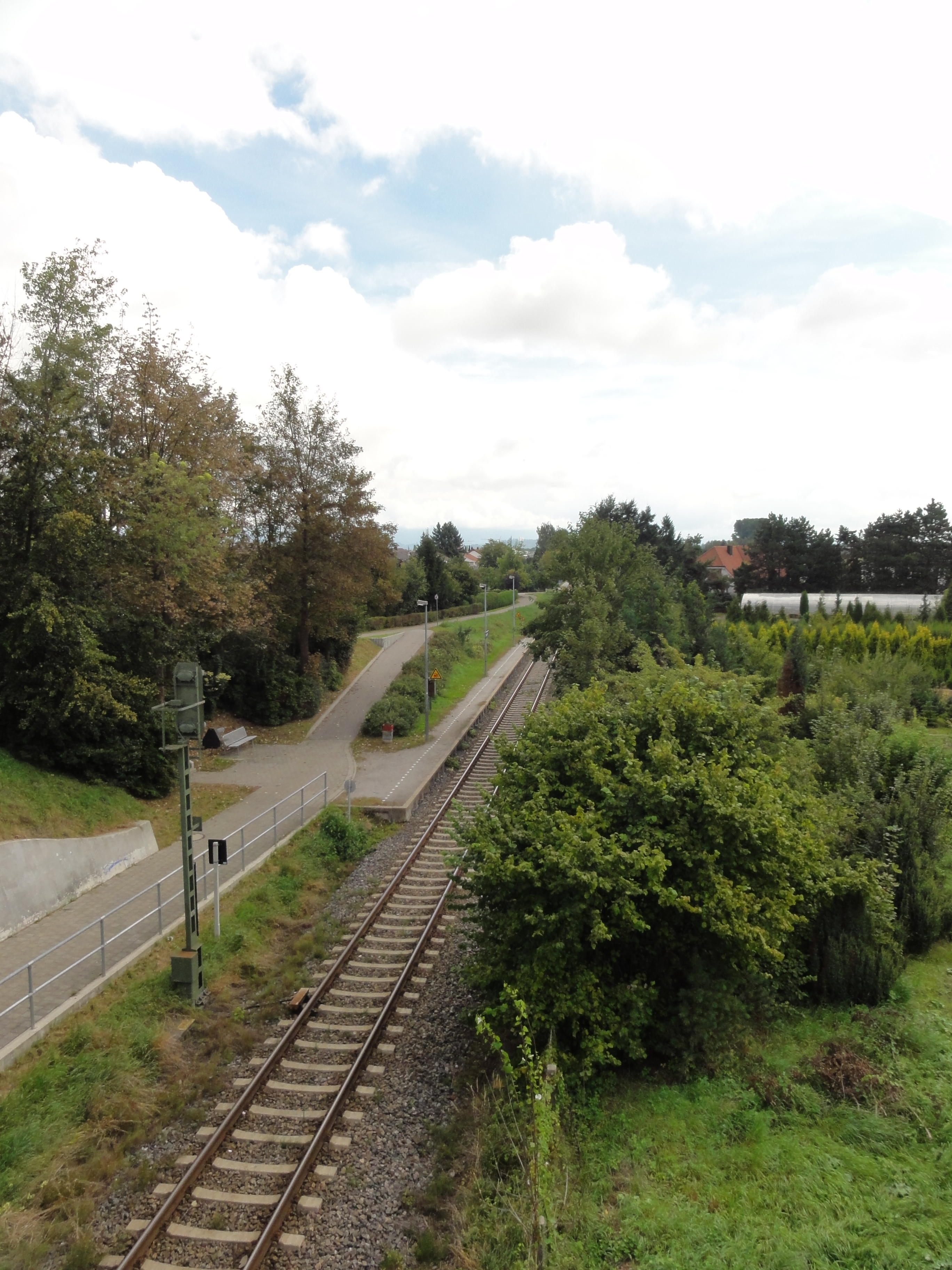 Haltepunkt Straubing Ost (keine Uhr, keine Anzeigetafel, kein Fahrplan, kein Unterstand, kein Personal, kein Fahrkartenautomat, kein Toiletten etc.) Object location48° 52′ 35.17″ N, 12° 35′ 32.46″ E Info GPS data may be inaccurate. EXIF data regarding date and time may be inaccurate.